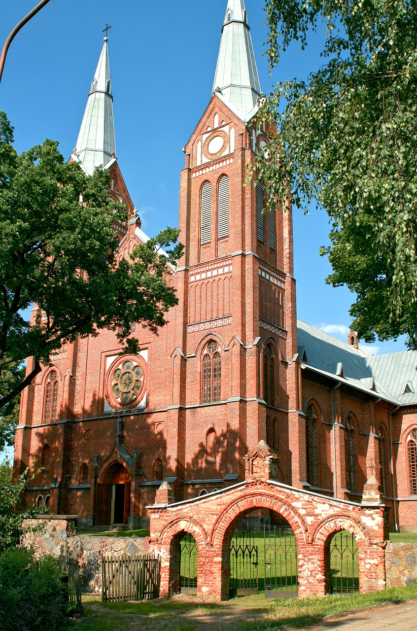 Jurbarko Švč. Trejybės bažnyčia Šios nuotraukos autorius E. Giedraitis leidžia naudoti nuotrauką be apribojimų, taip pat ir komerciniais tikslais